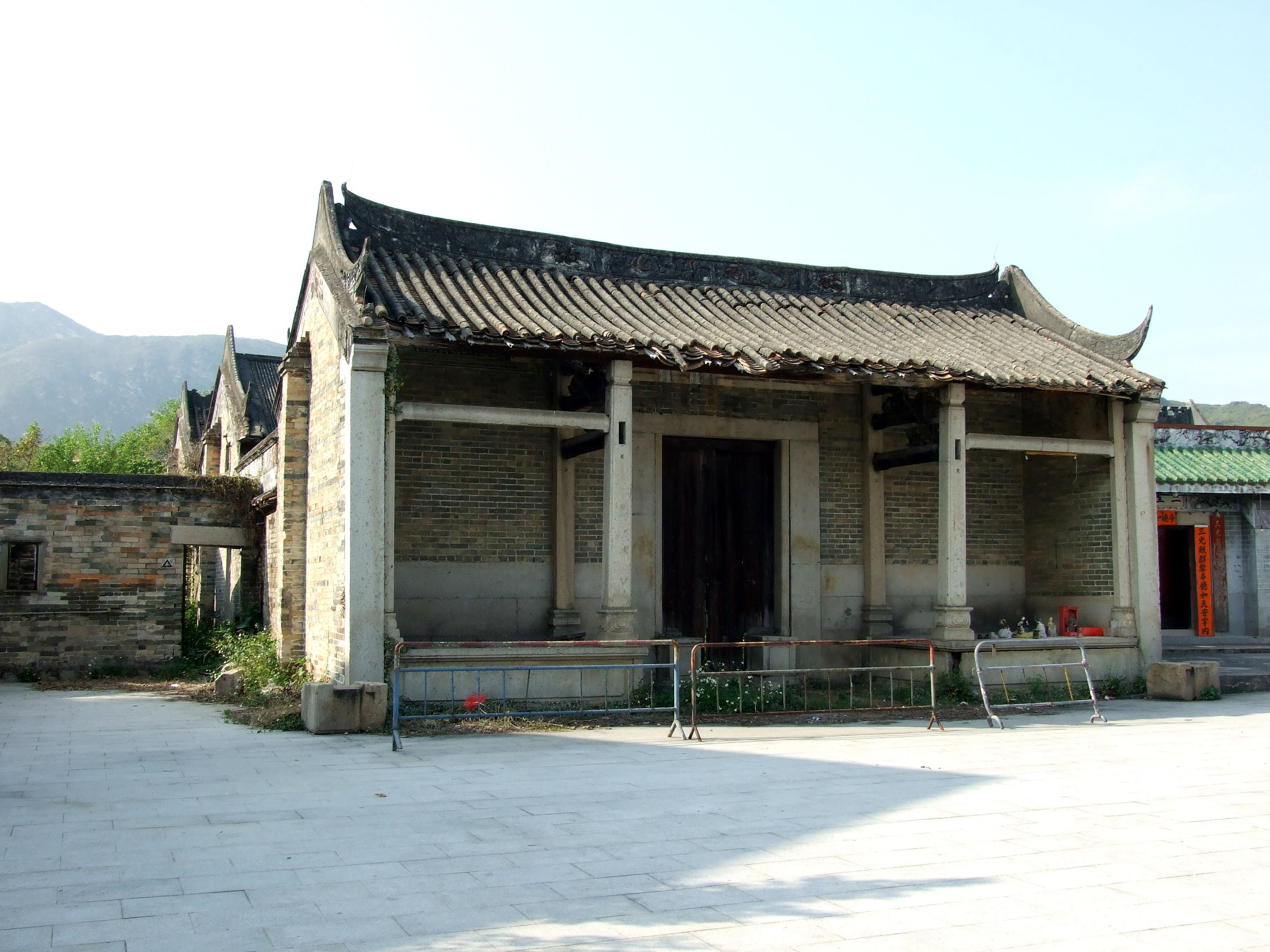 中文（香港）: 屯子圍陶氏宗祠